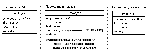 Переименование столбца zarplata в salary. Для описания схемы используется нотация UML Data Modeling Notation